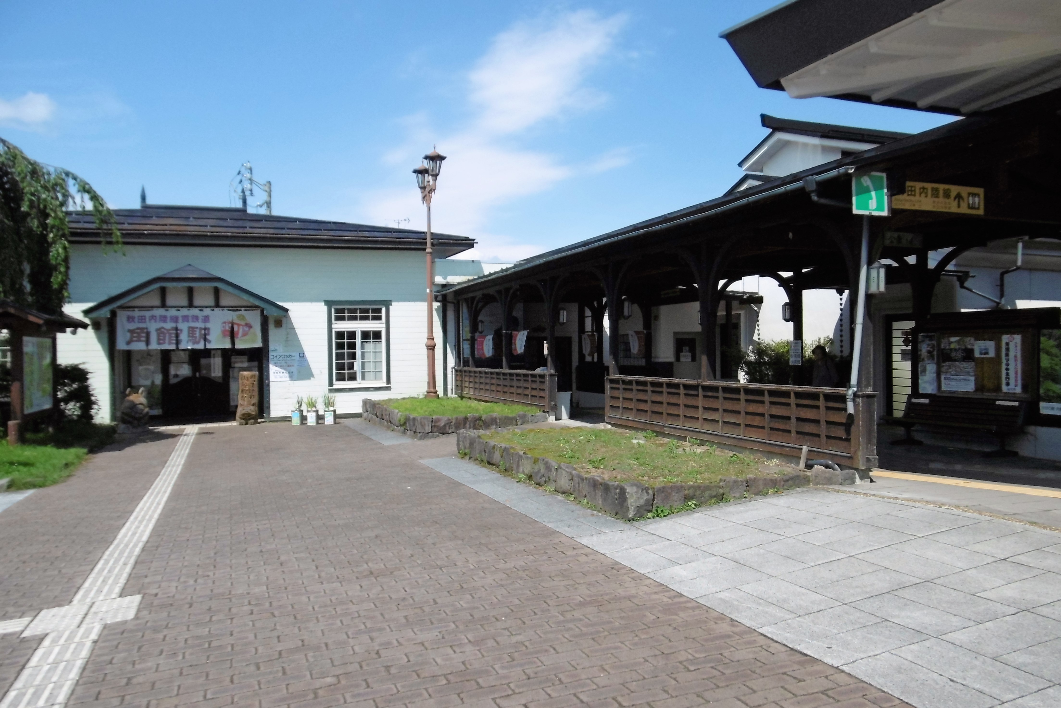 秋田内陸線 角館駅